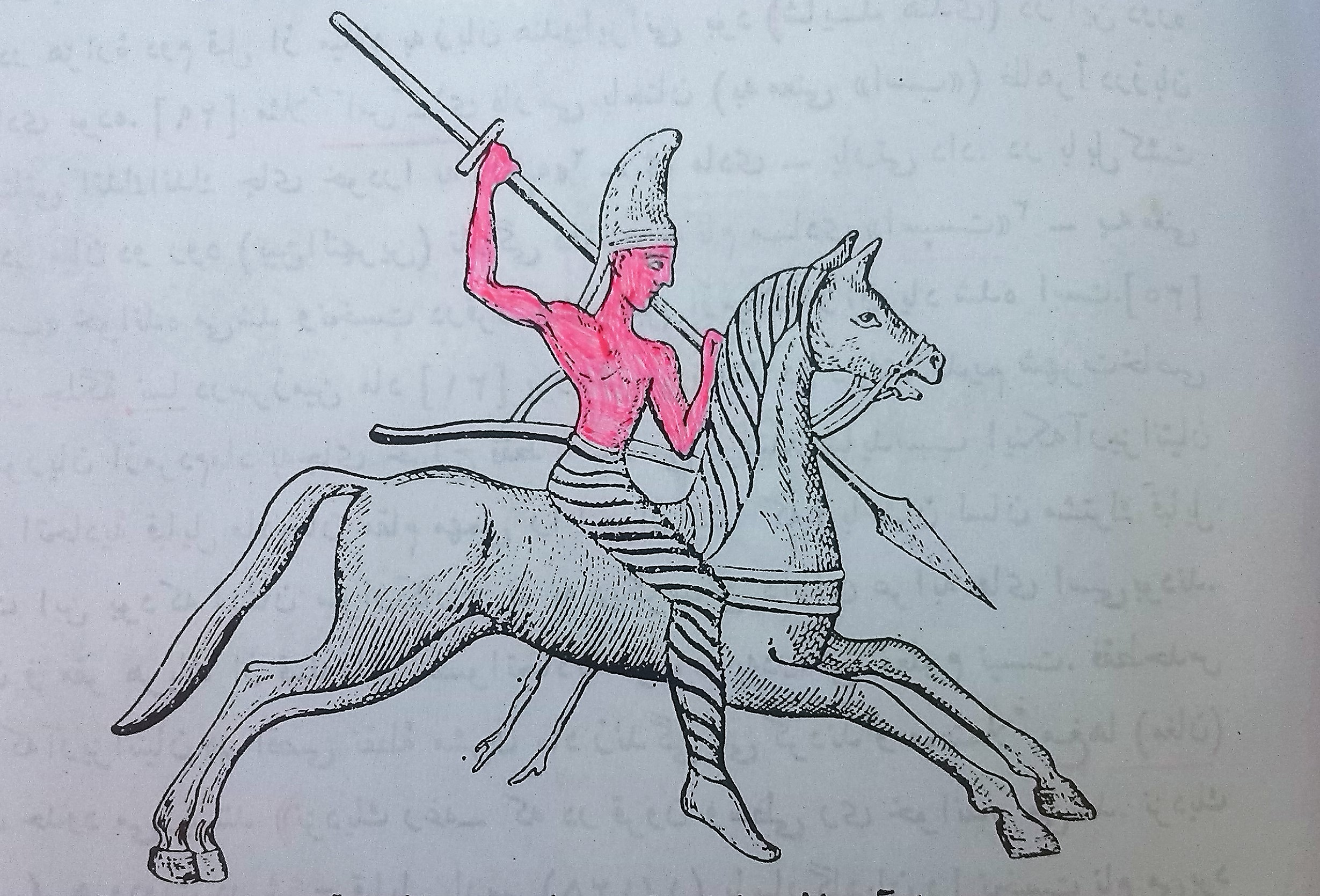 سواری منسوب به آریزانت‌ مادی. تصویر از مهر عیلامی قرن هفتم و ششم پیش از میلاد